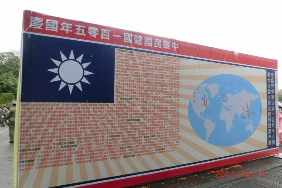 我愛國旗嘉年華參與團名國旗牆